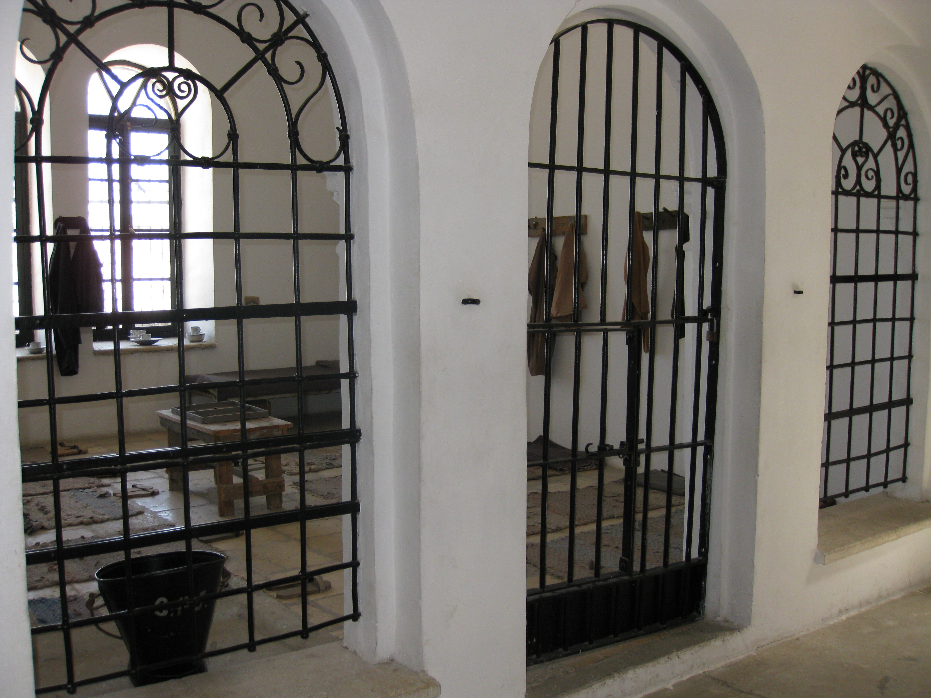 Museum of the Underground Prisoners מוזיאון אסירי המחתרות סורגים רוסיים המפרידים בין חלקו הישן של המבנה לשלב הבנייה השני (שלב ההרחבה של האכסנייה הרוסית)